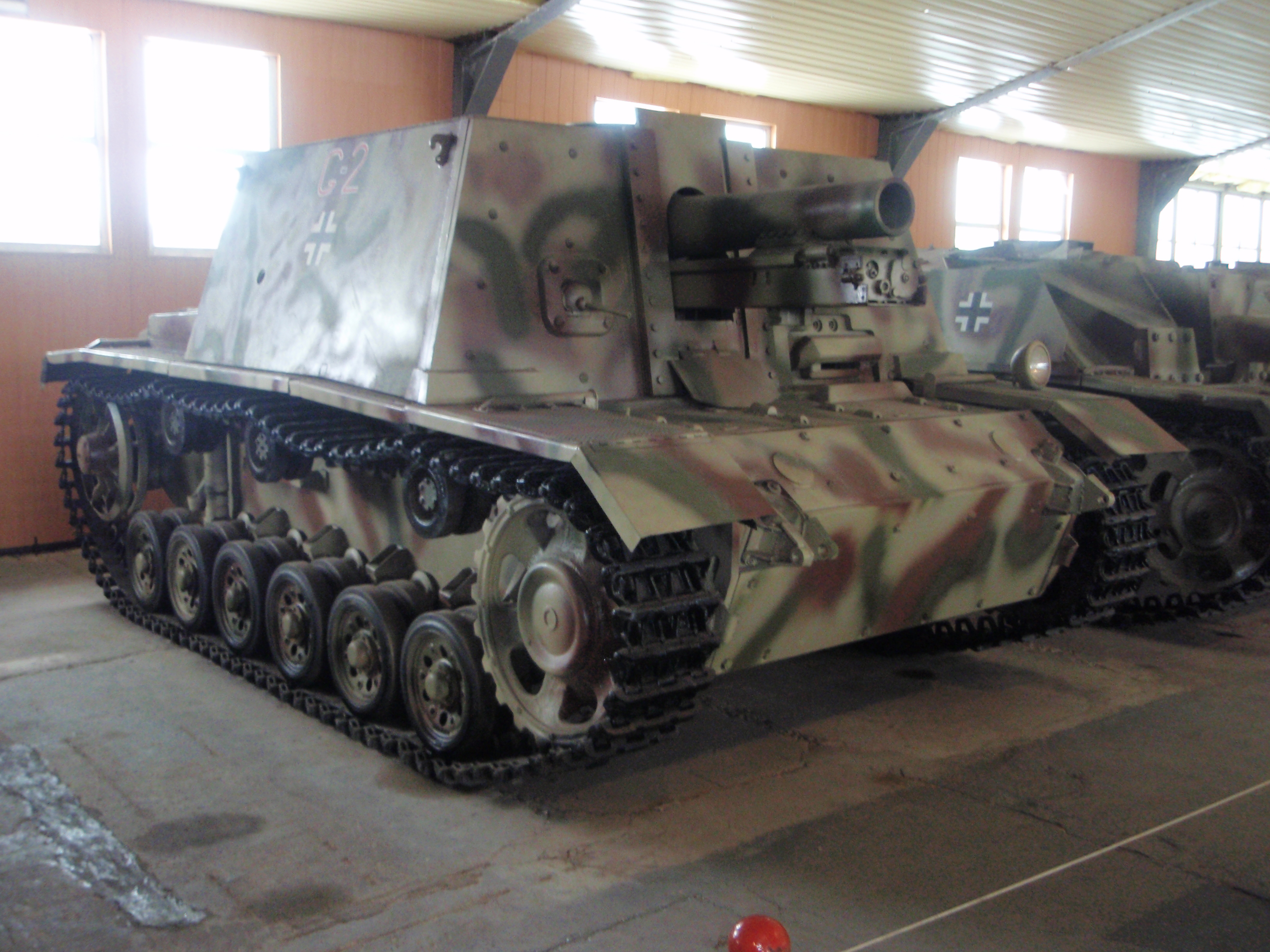 Самоходная установка StuIG 33B в Центральном музее бронетанкового вооружения и техники в Кубинке.